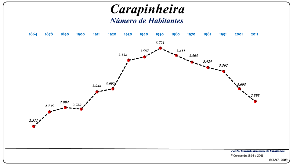 População